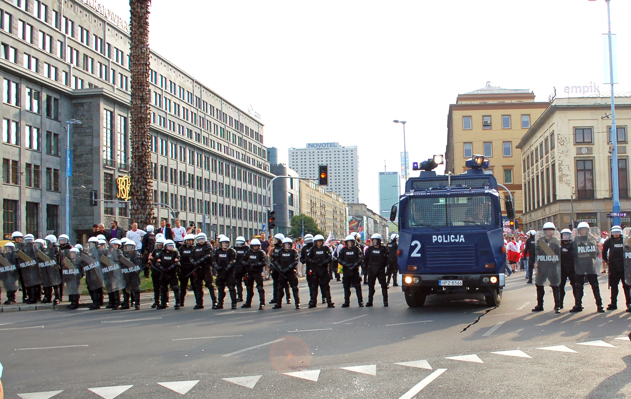 Polizeiangehörige und ein Wasserwerfer Tajfun III stehen in Warschau zum Einsatz im Rahmen des Fußballspiels Polen gegen Russland bei der UEFA Euro 2012 bereit. UEFA Euro 2012, Poland-Russia, 12.06.2012